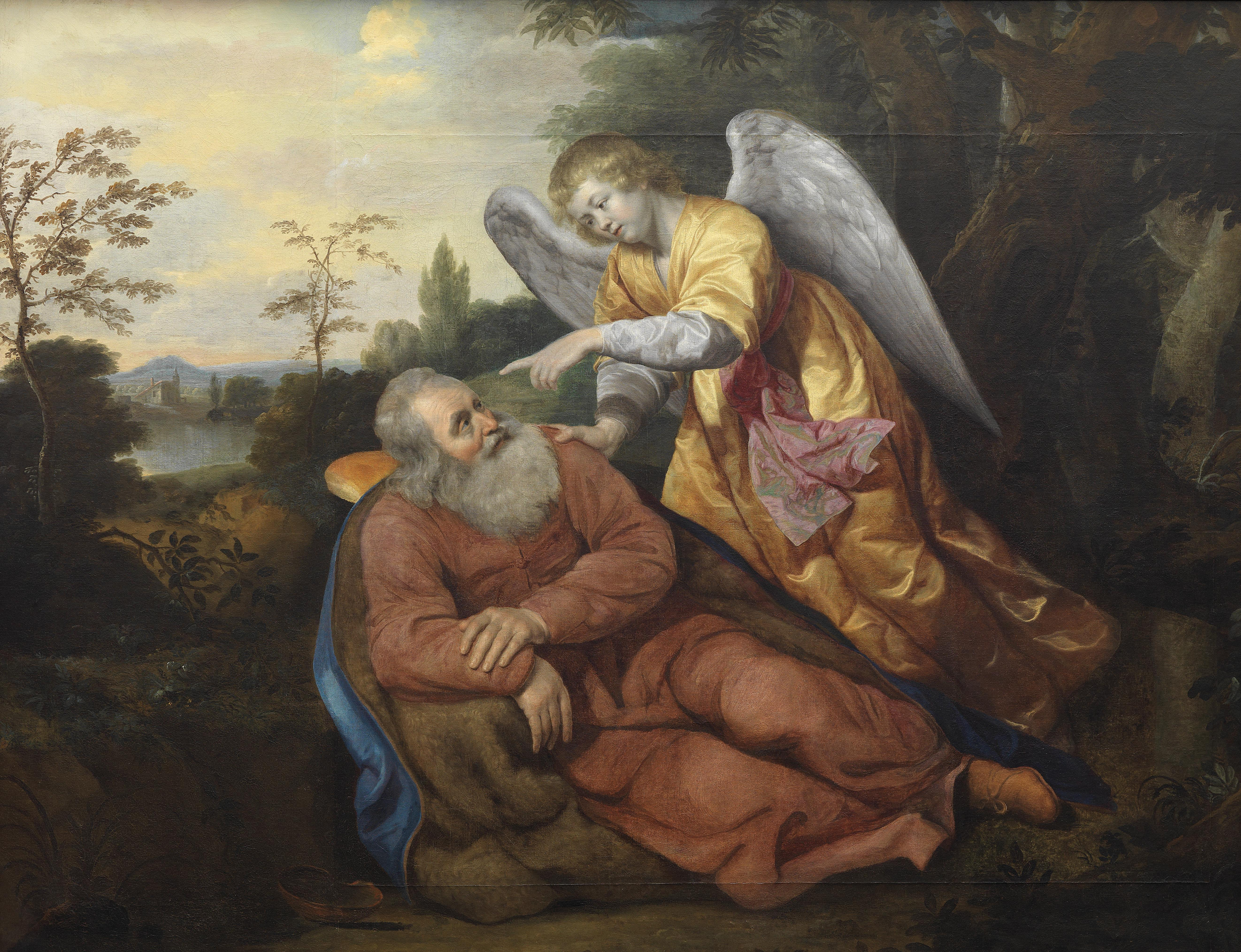 Der Engel weckt Elias in der Wüste